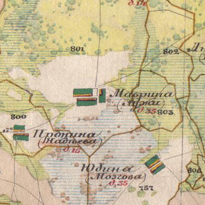 Деревня Маврино на карте 1850 года